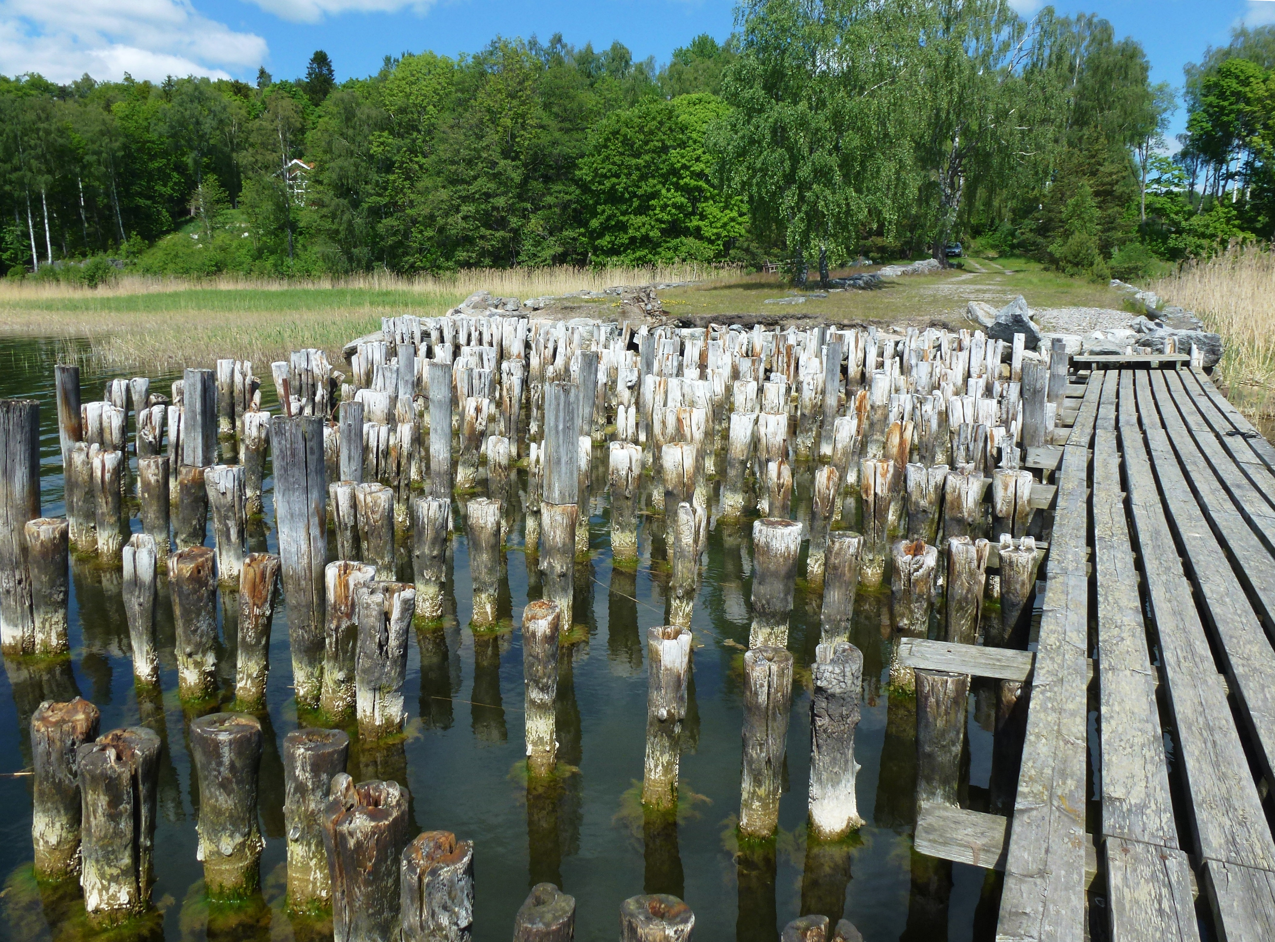 Sjöbergs varv, piren med rester av stapelbädden